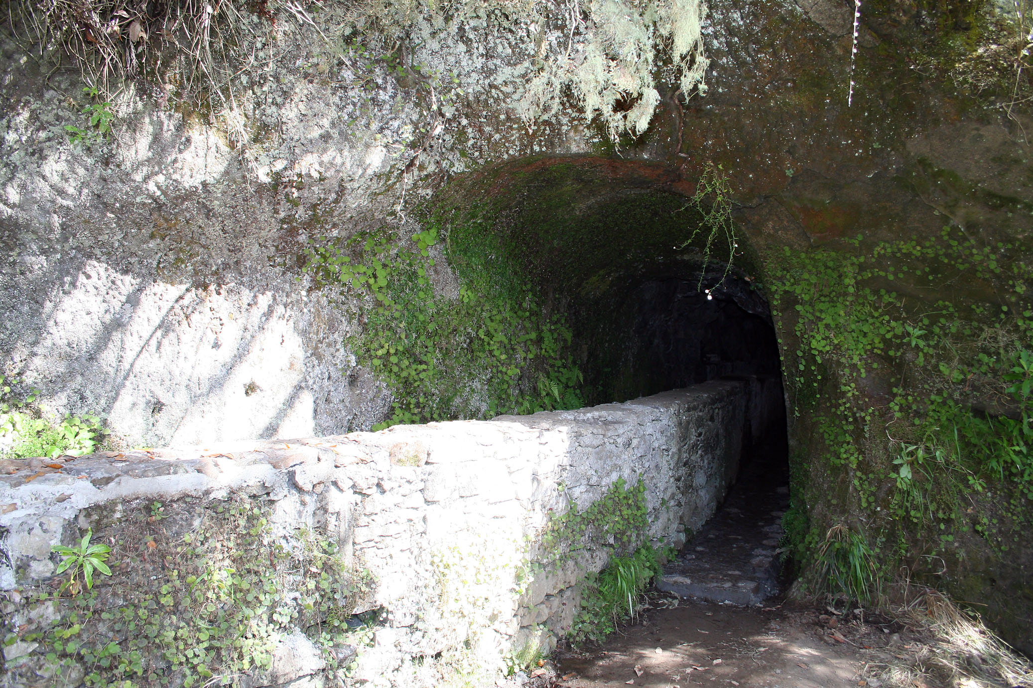 Die Levada läuft durch einen Tunnel.